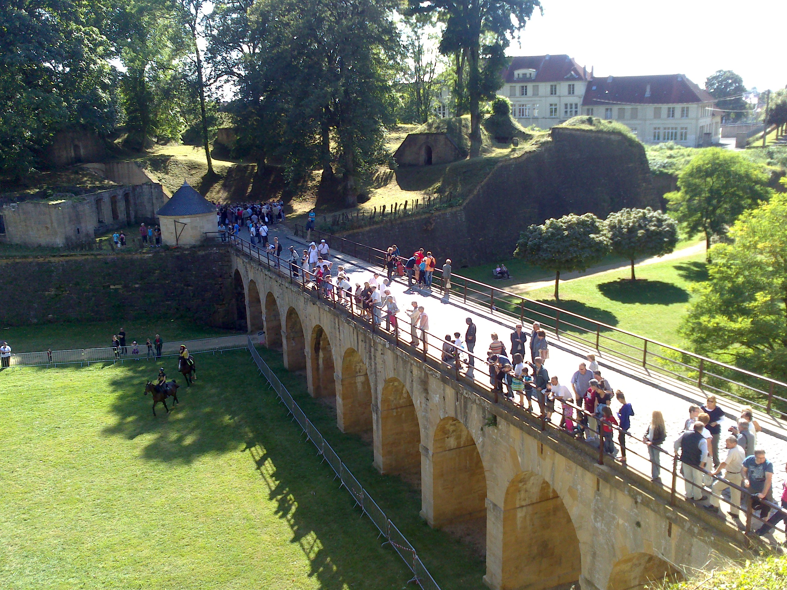 Citadelle de Longwyouvrage fortifie, enceinte, bastion, courtine, porte .